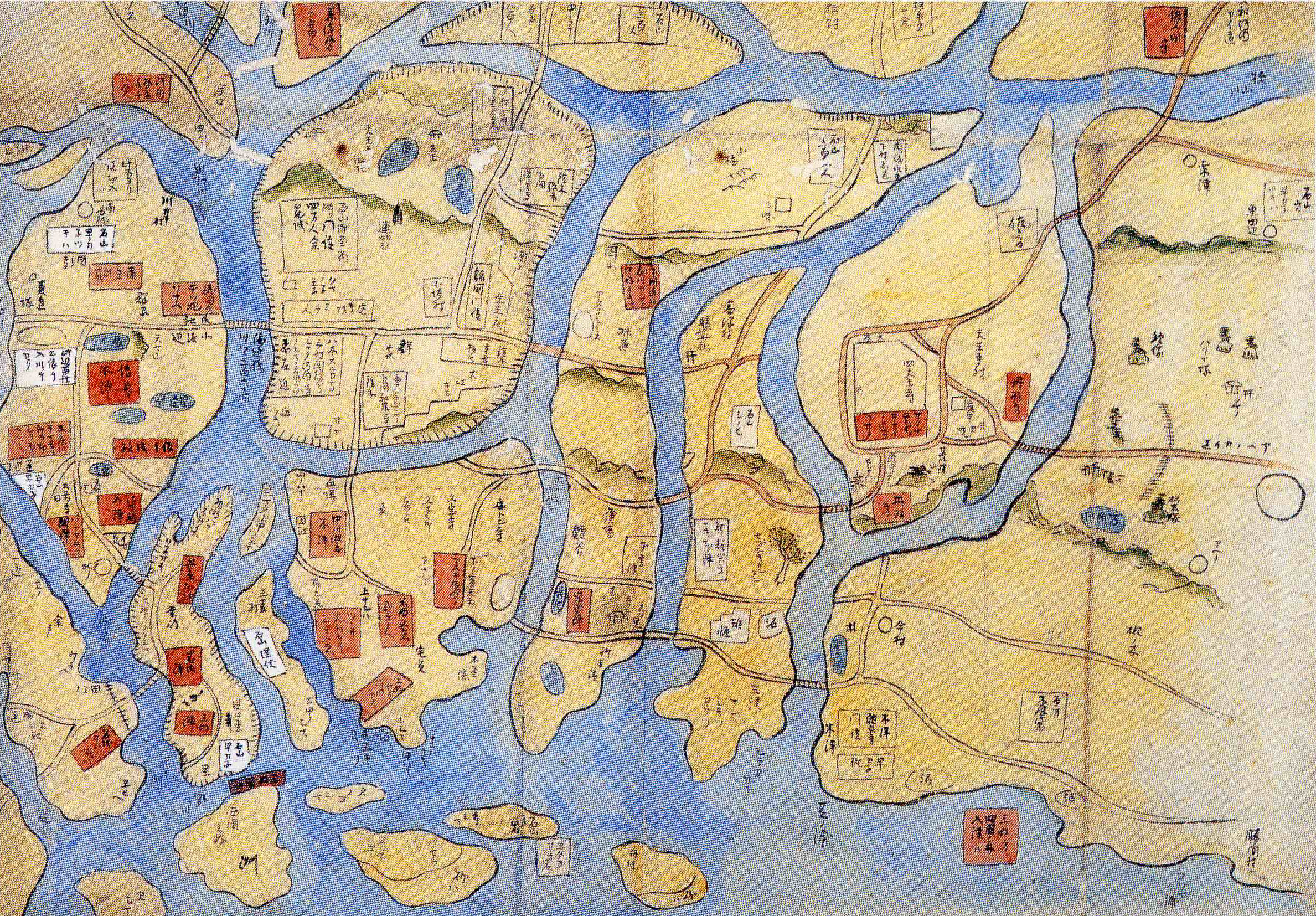 石山合戦配陣図